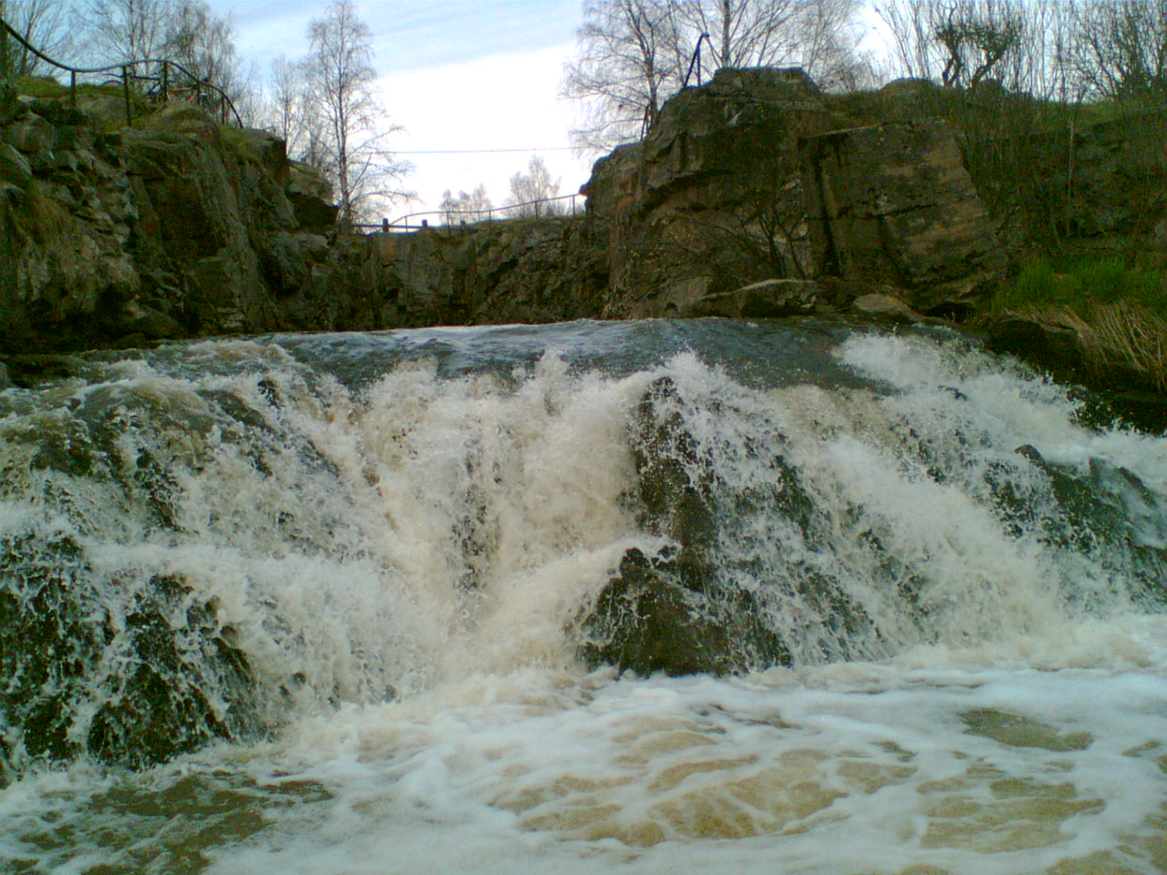 Uusimaa, Finland